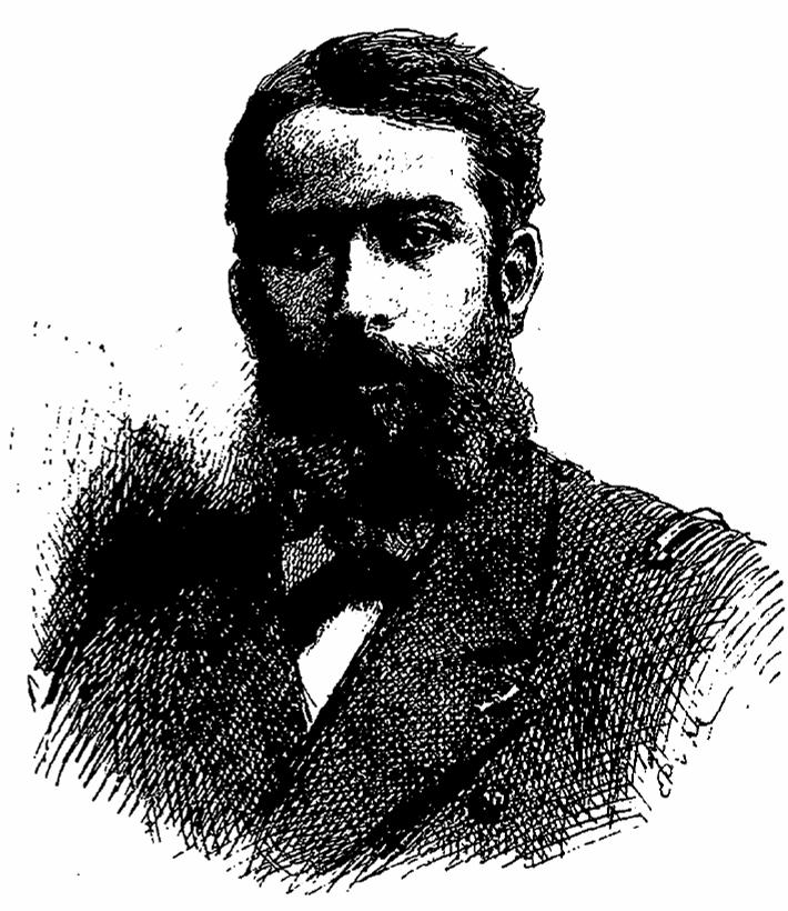 Le Docteur Noël Ballay, explorateur et administrateur colonial (Conférences et lettres de P. Savorgnan de Brazza sur ses trois explorations dans l'Ouest africain, de 1875 à 1886, 1887, p. 119.